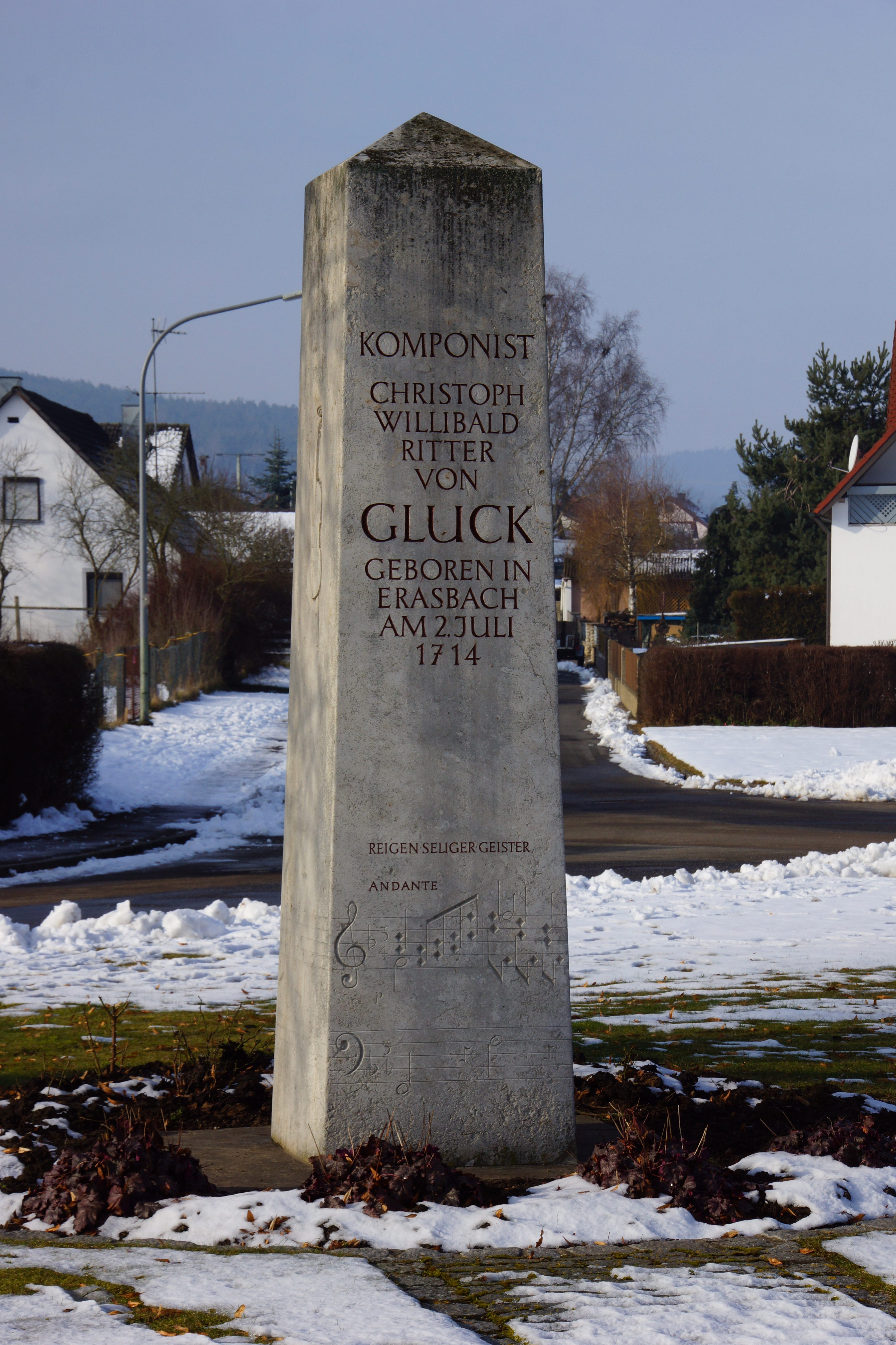 Das Denkmal für den Komponisten Christoph Willibald Gluck in Erasbach